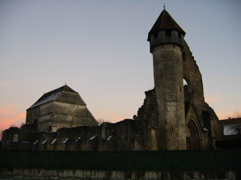 Kloster Cârţa